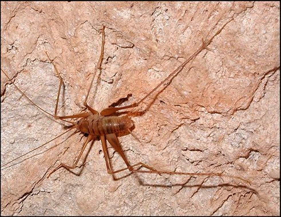 Mâle de Dolichopoda linderi dans la grotte du Gourp des Boeufs